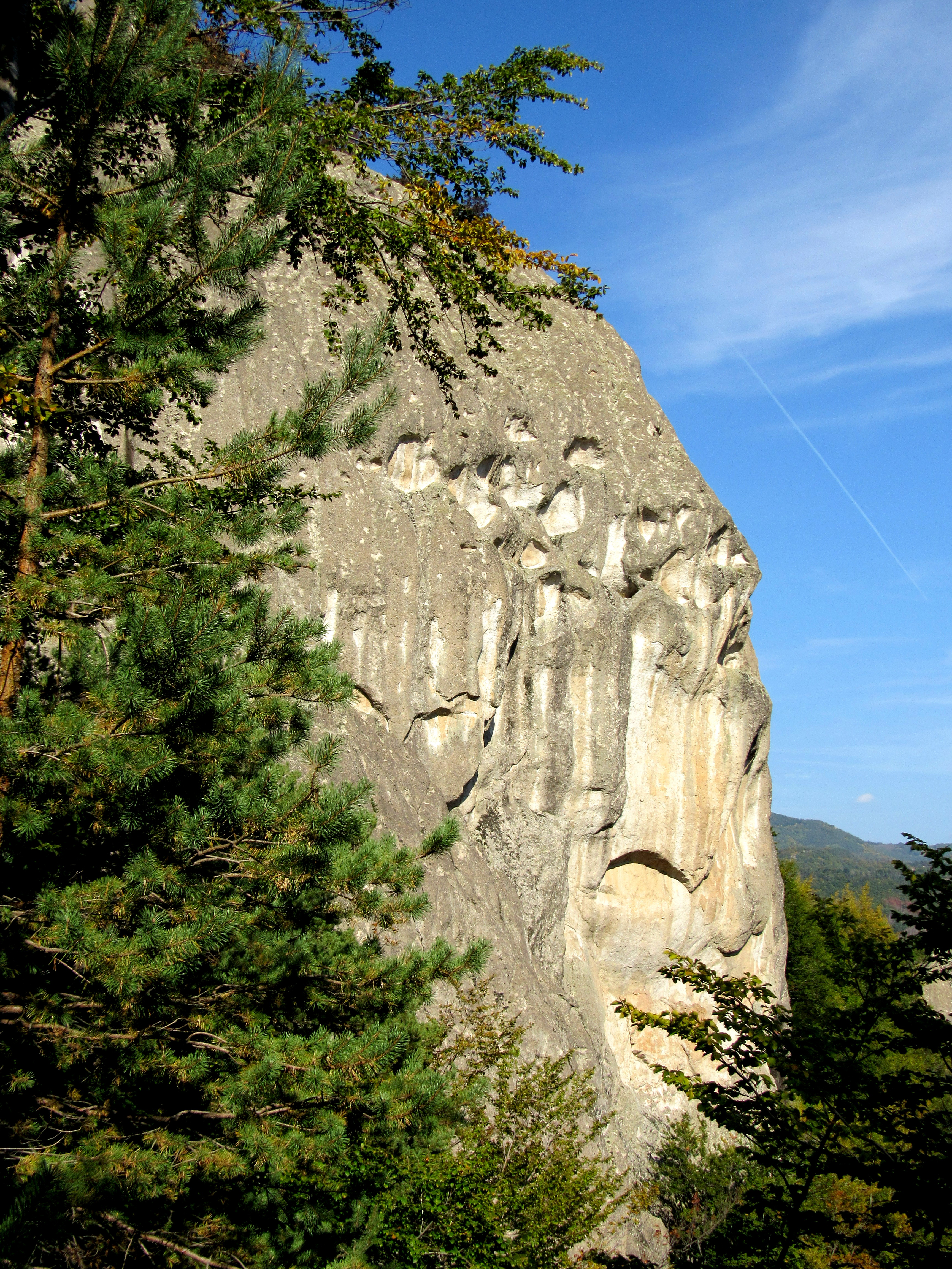 Хайдут кая